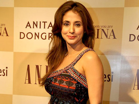 Urmila Matondkar at Anita Dongre's store launch